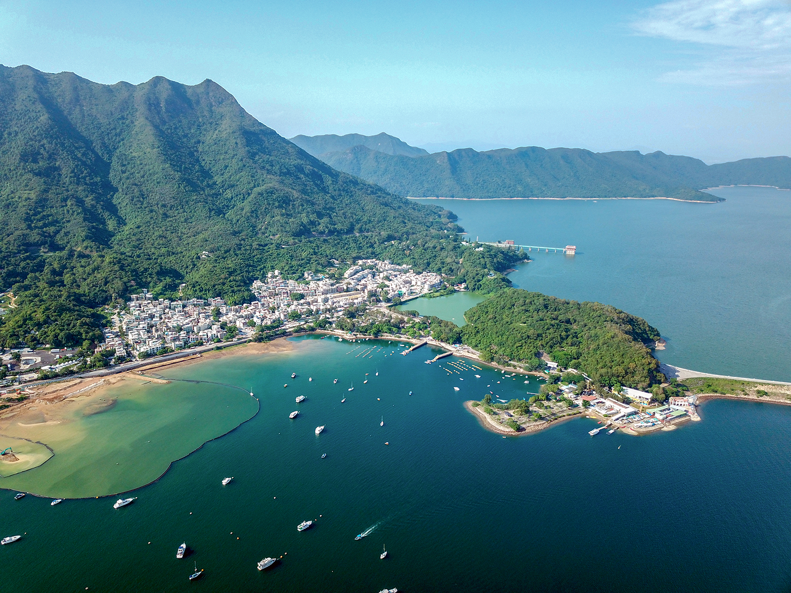 Tai Mei Tuk